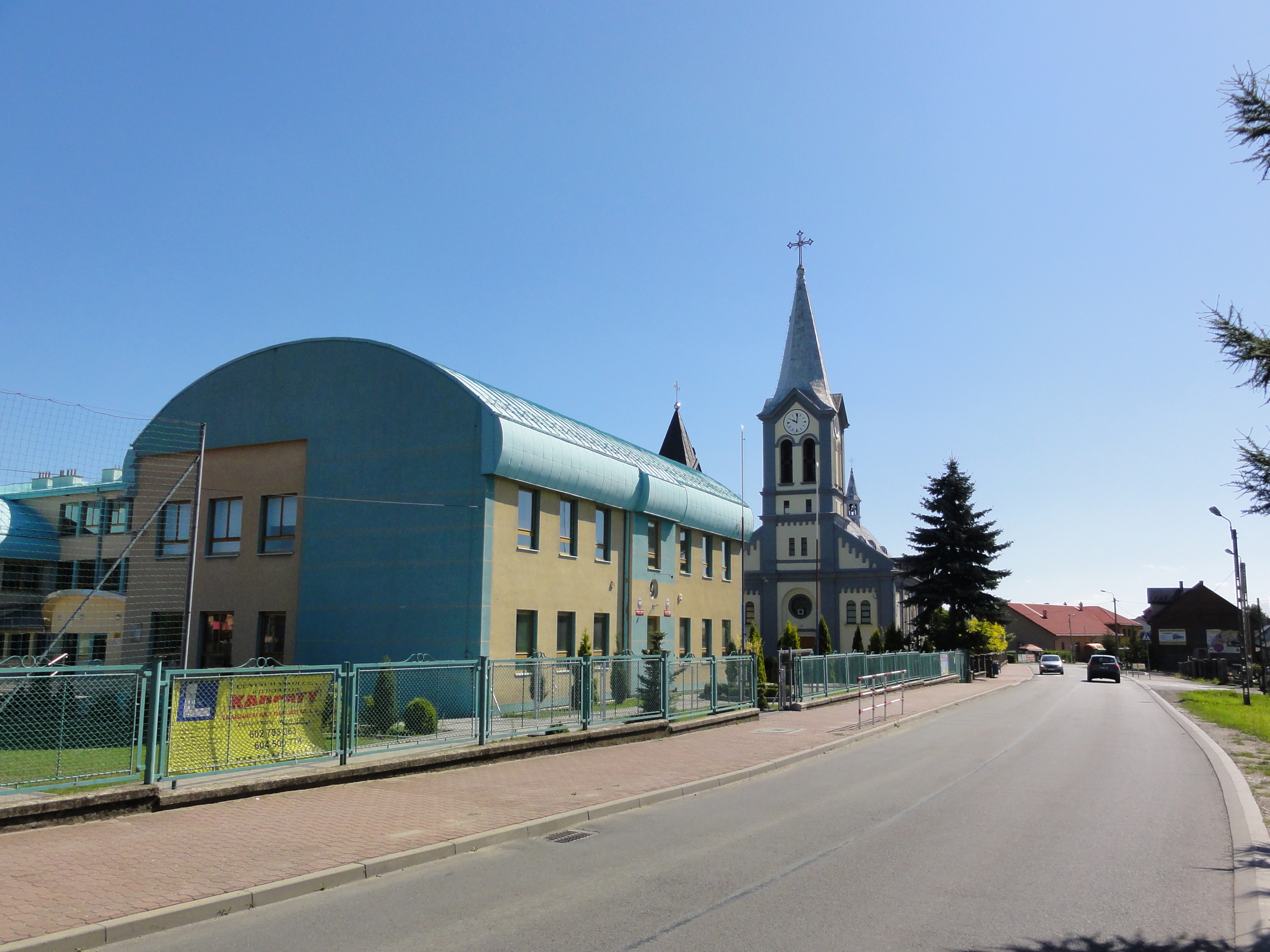 Centrum Rybarzowic